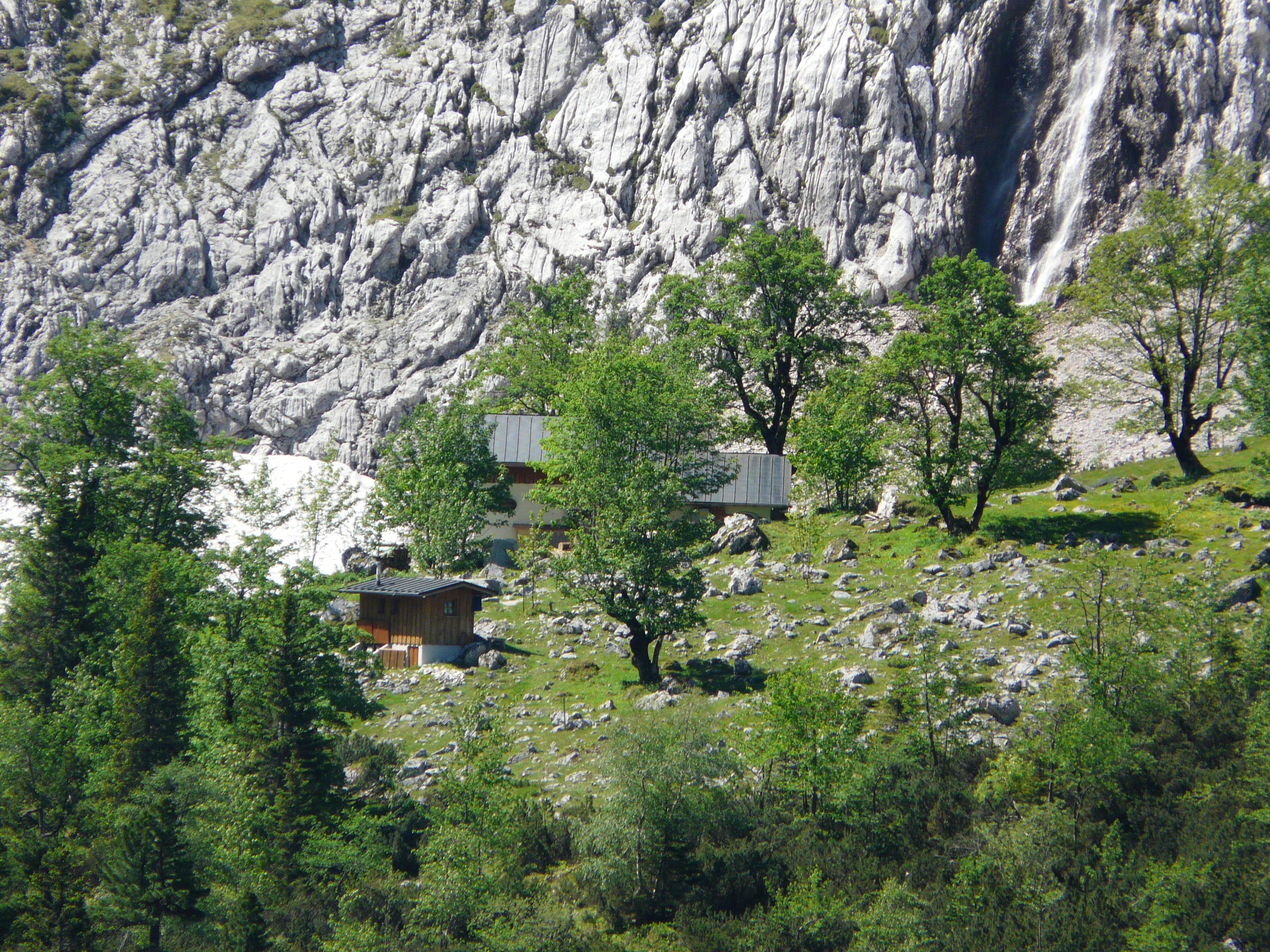 Oberreintalhütte im lichten Mischwald (u.a. Zirbe und Bergahorn)